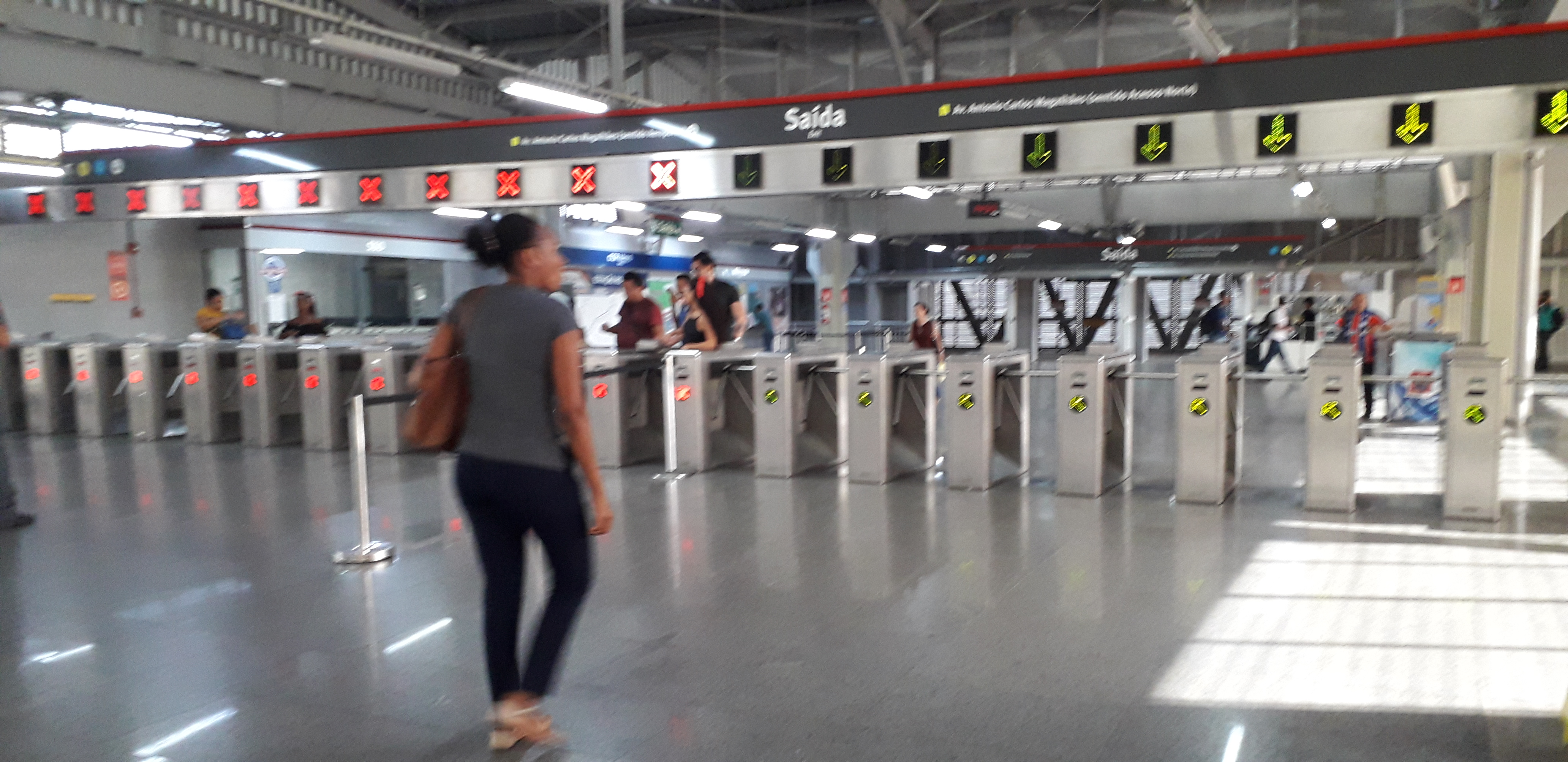 Imagens internas da Estação Rodoviária, Linha 2 do Sistema Metroviário de Salvador e Lauro de Freitas